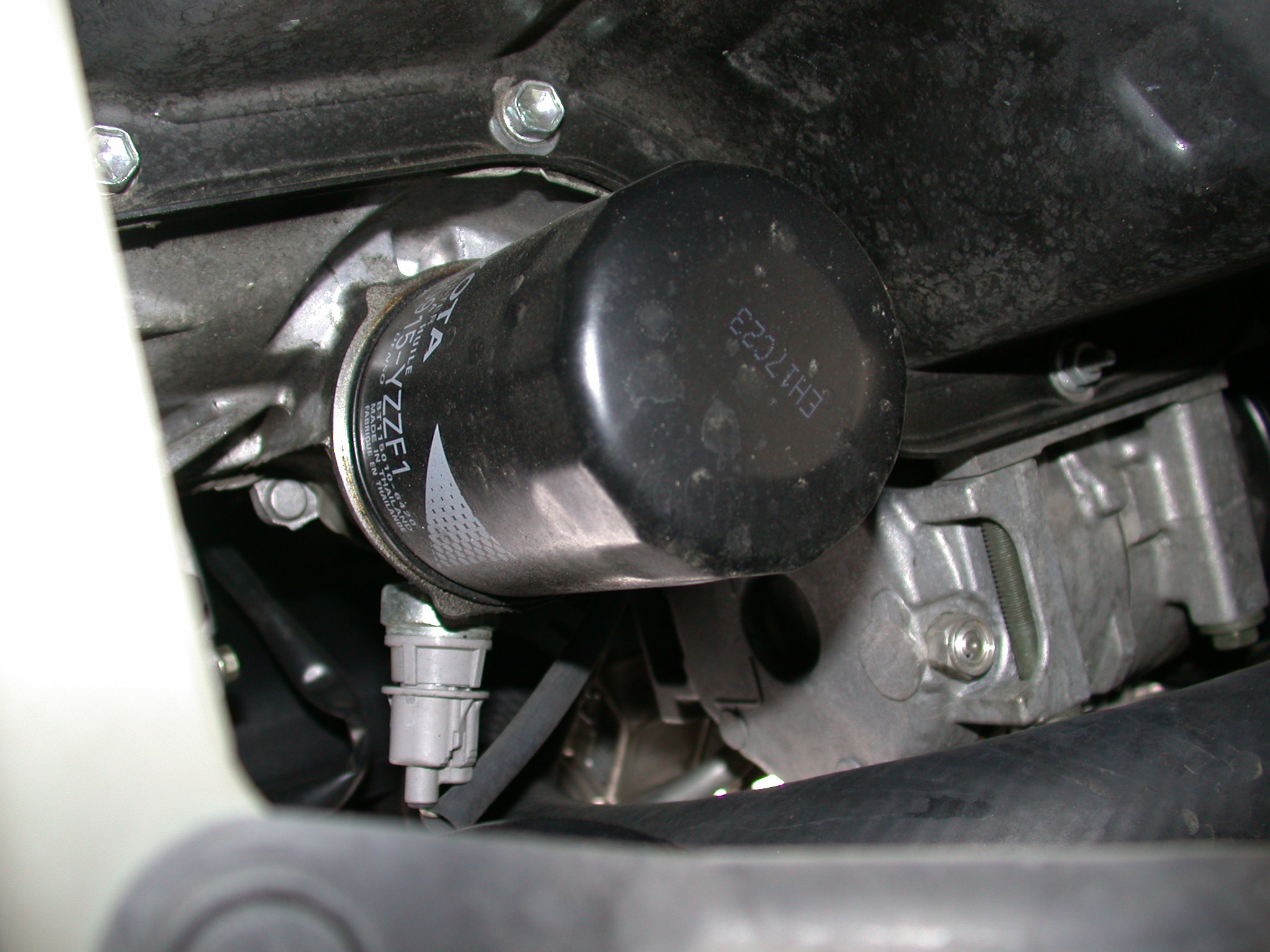 Oil filter for motor oil in an automobile.